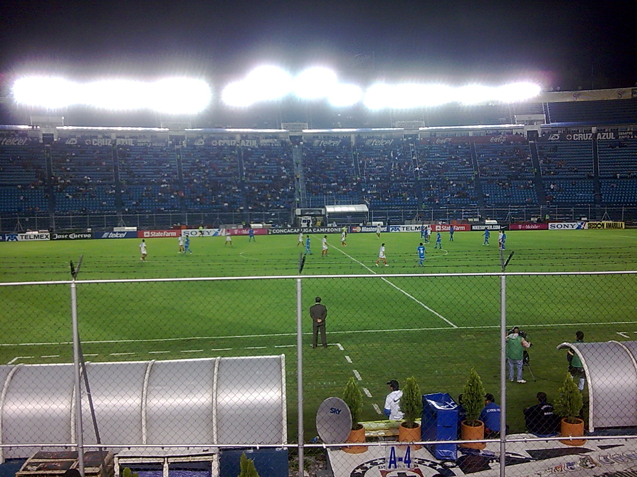 cruz azul in concacaf champions ligue